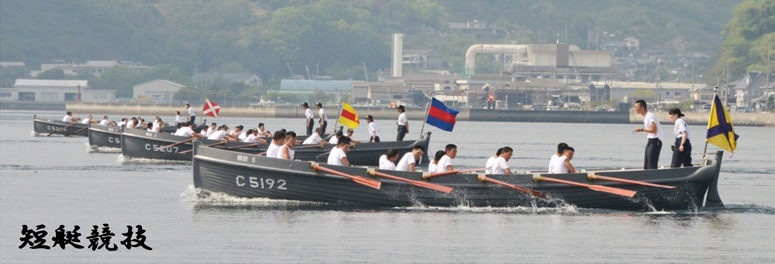 幹部候補生学校短艇競技